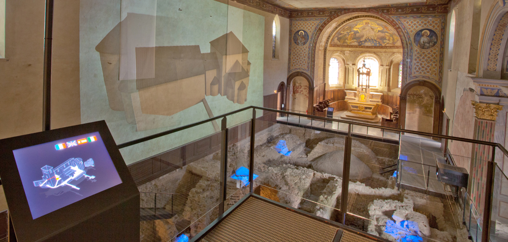 Scénographie de Jean-Noël Duru : bornes interactives en quatre langues, film projeté sur le mur nord de Bernard David-Cavaz et Yannick Bonnefoy.